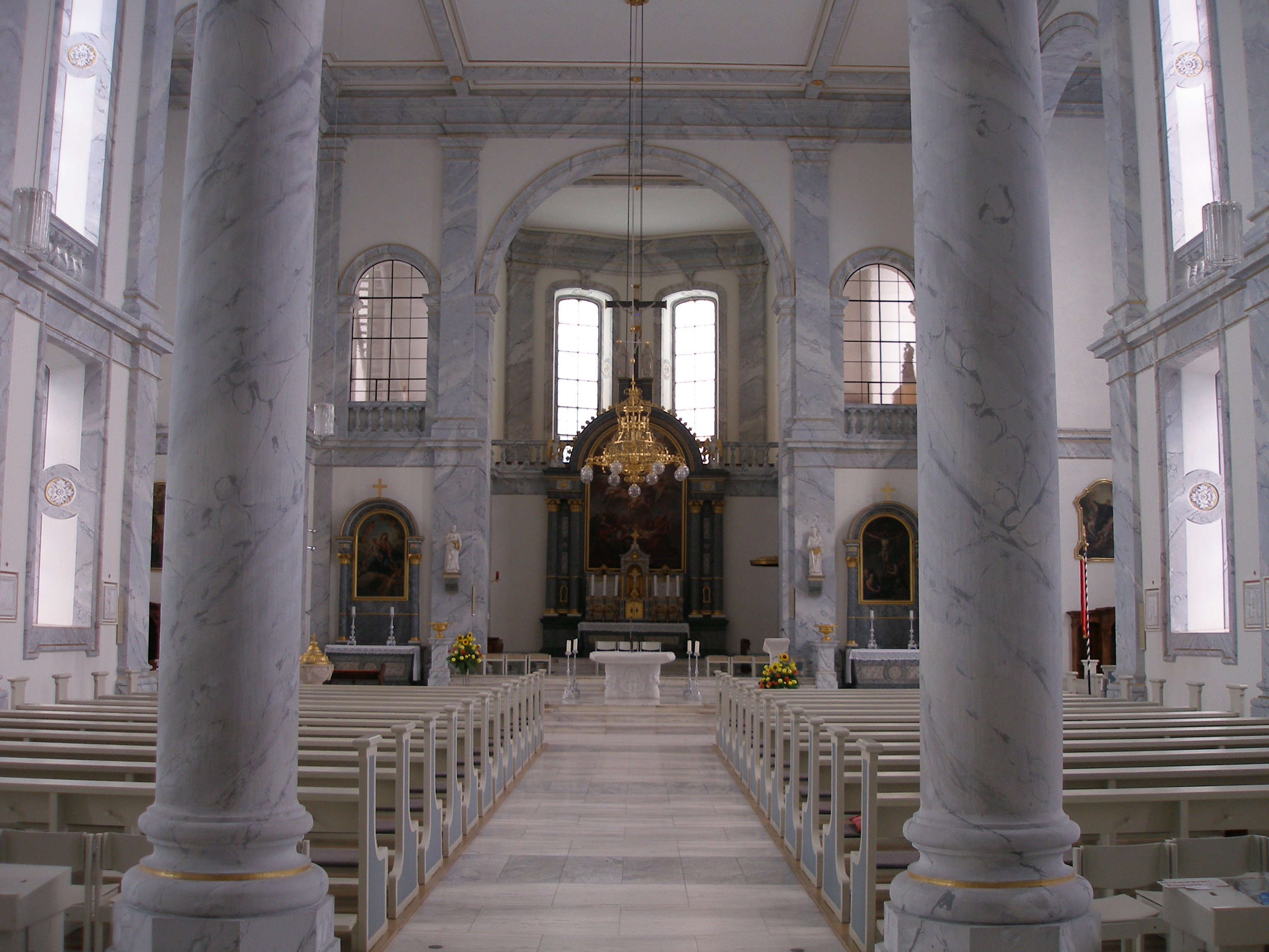 Kloster Schuttern